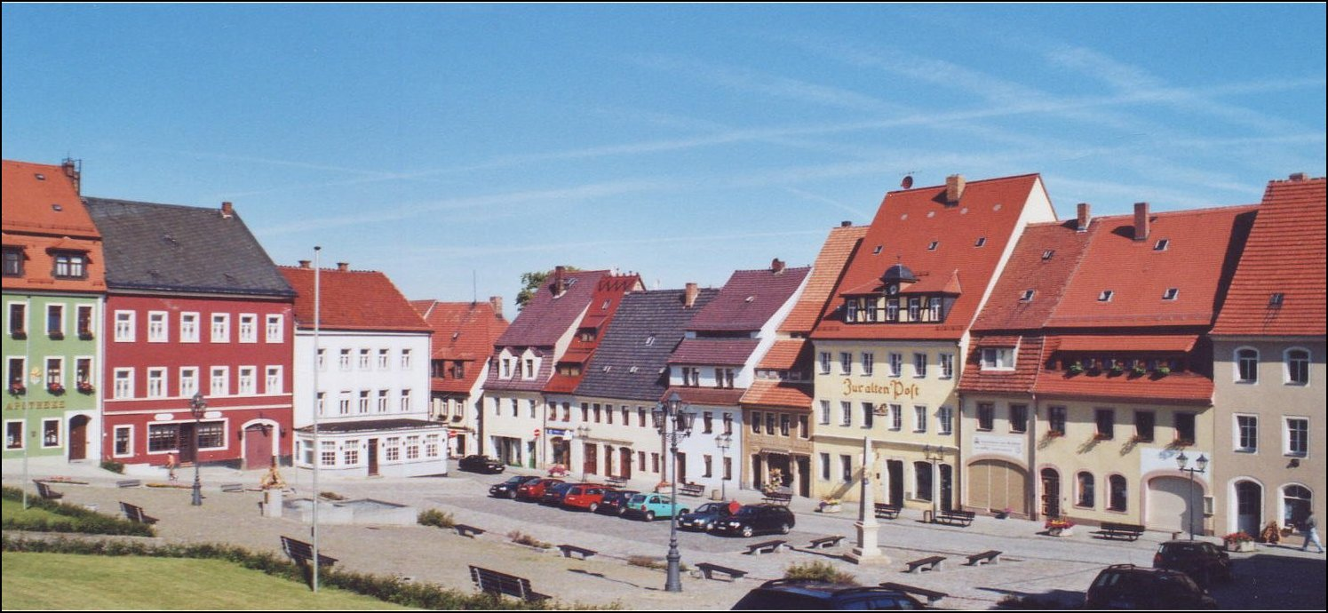 Stolpen: Blick auf die Nordseite des Marktplatzes.